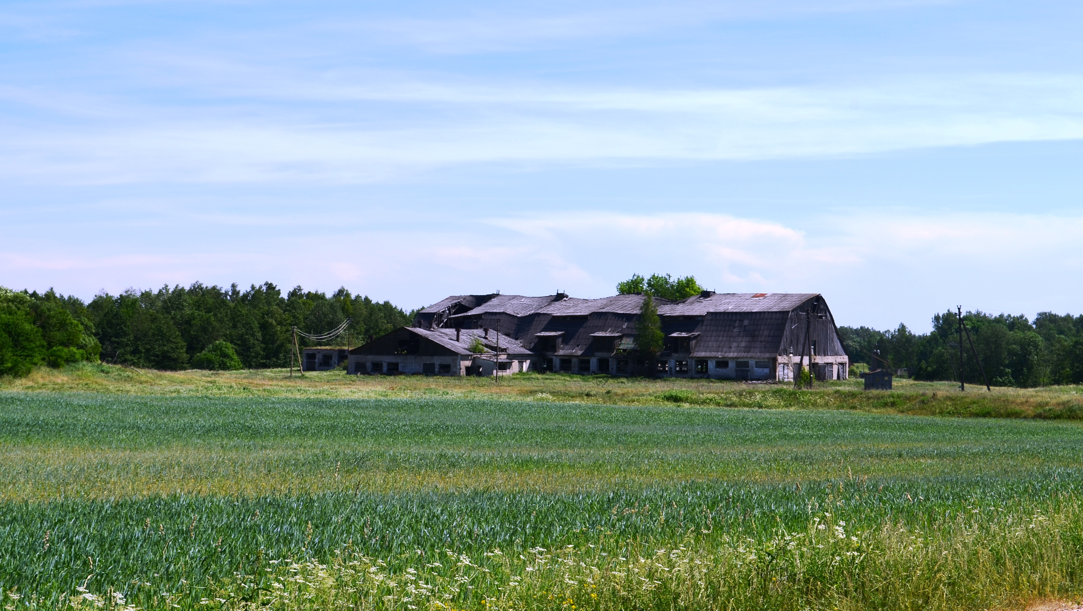 Fermos griuvėsiai, Puodžiūnai, Vilniaus r.